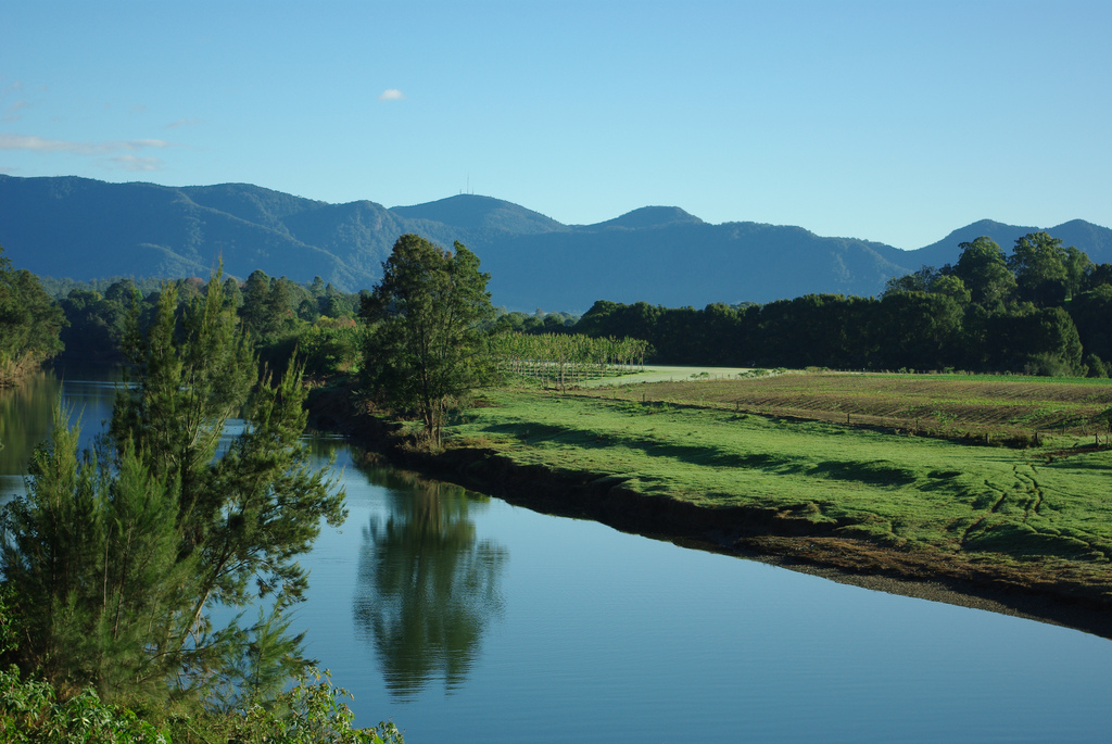 Bellinger River